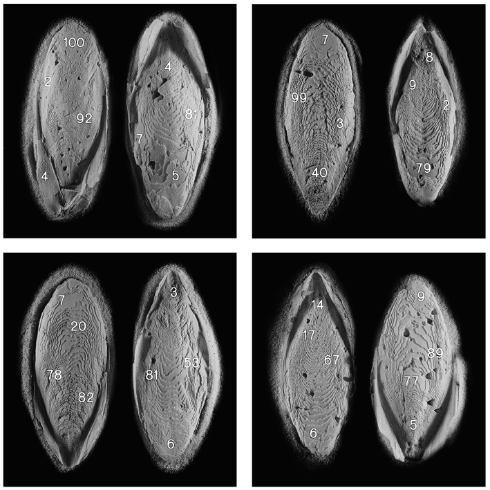 Hans-Peter Klie: Amorphe Begriffe - os sepiae. 1998. Silbergelatineprints